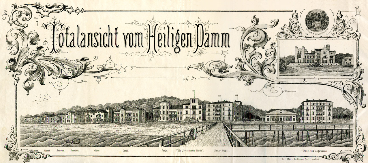 Panoramaansicht - Heiligendamm vom damaligen Seesteg aus